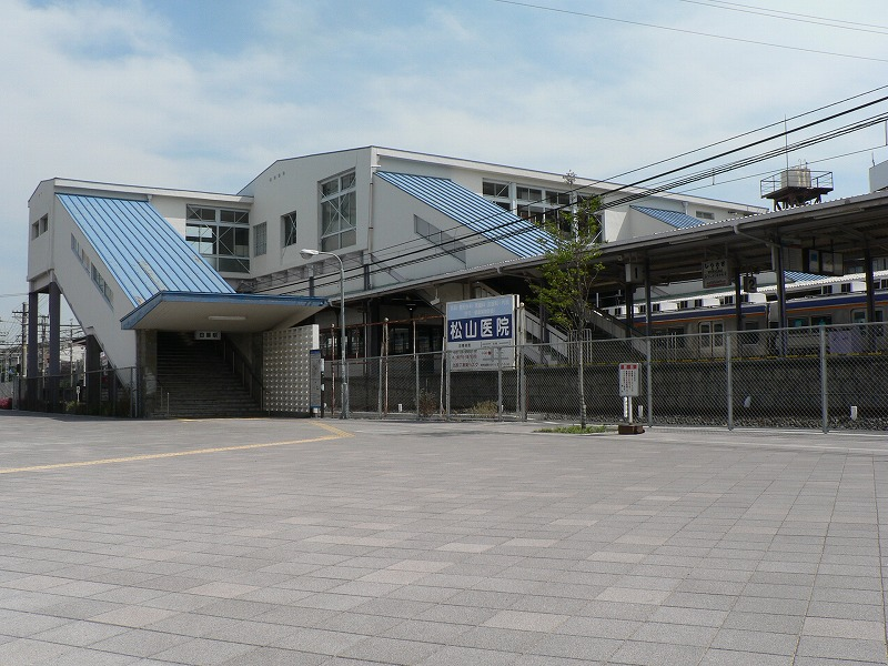 南海高野線白鷺駅北口